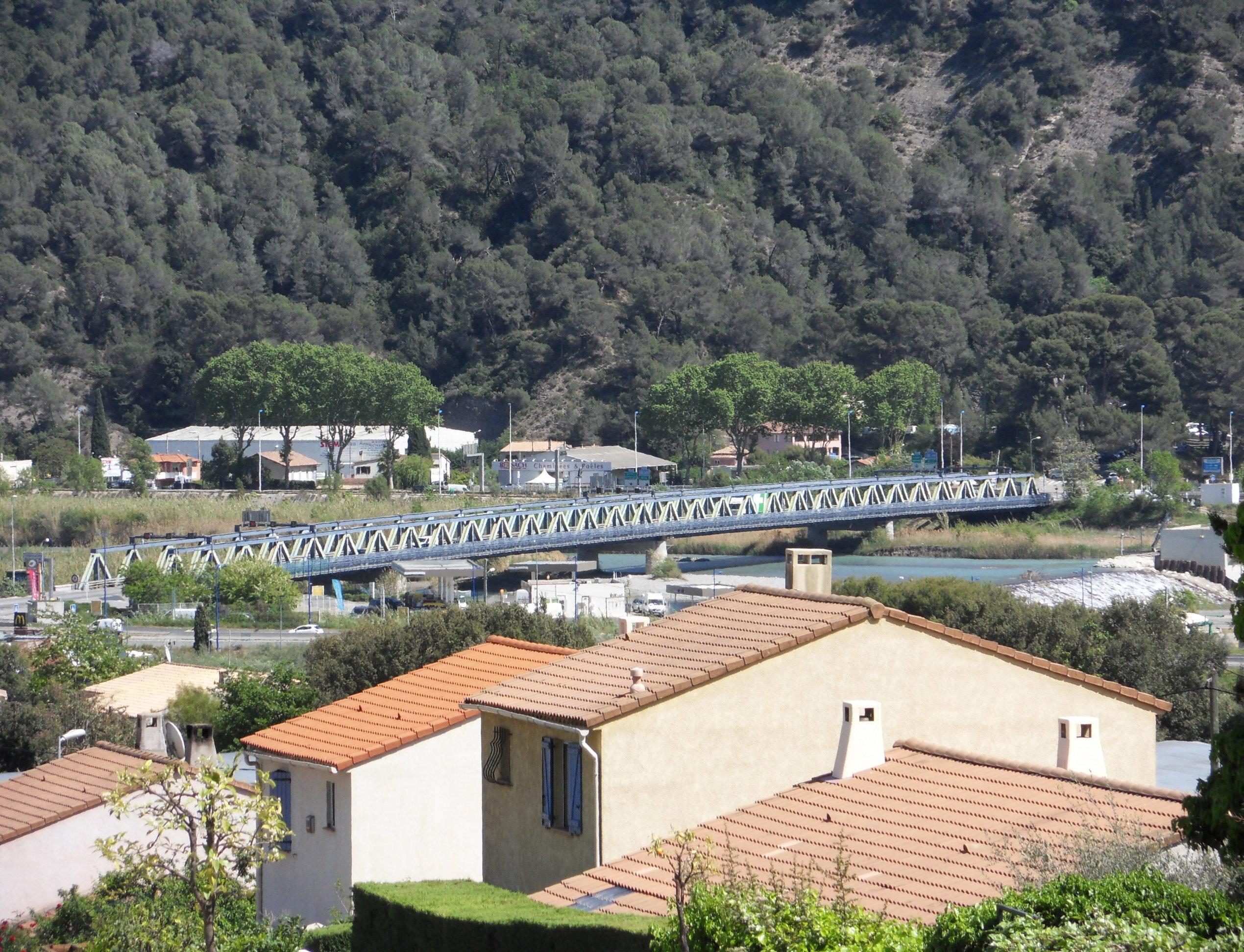 Ligne Central-Var. Localité de Carros et de Colomars. Pont de la Manda dans sa forme actuelle. Vu depuis le chemin de Provence à Gattières. Franchit le Var.